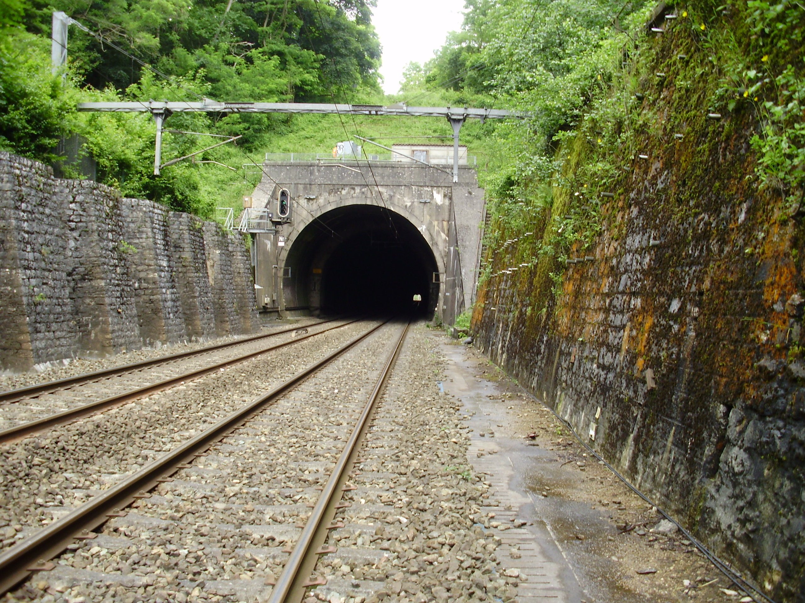 Tunnel de Bréval, entrée ouest sur le territoire de Bréval, Yvelines, France.